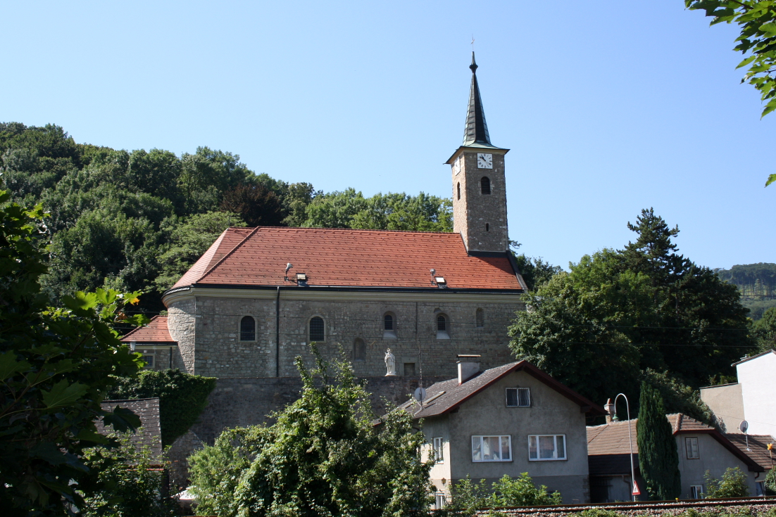 Die Pfarrkirche des niederösterreichischen Dorfes Höflein an der Donau.